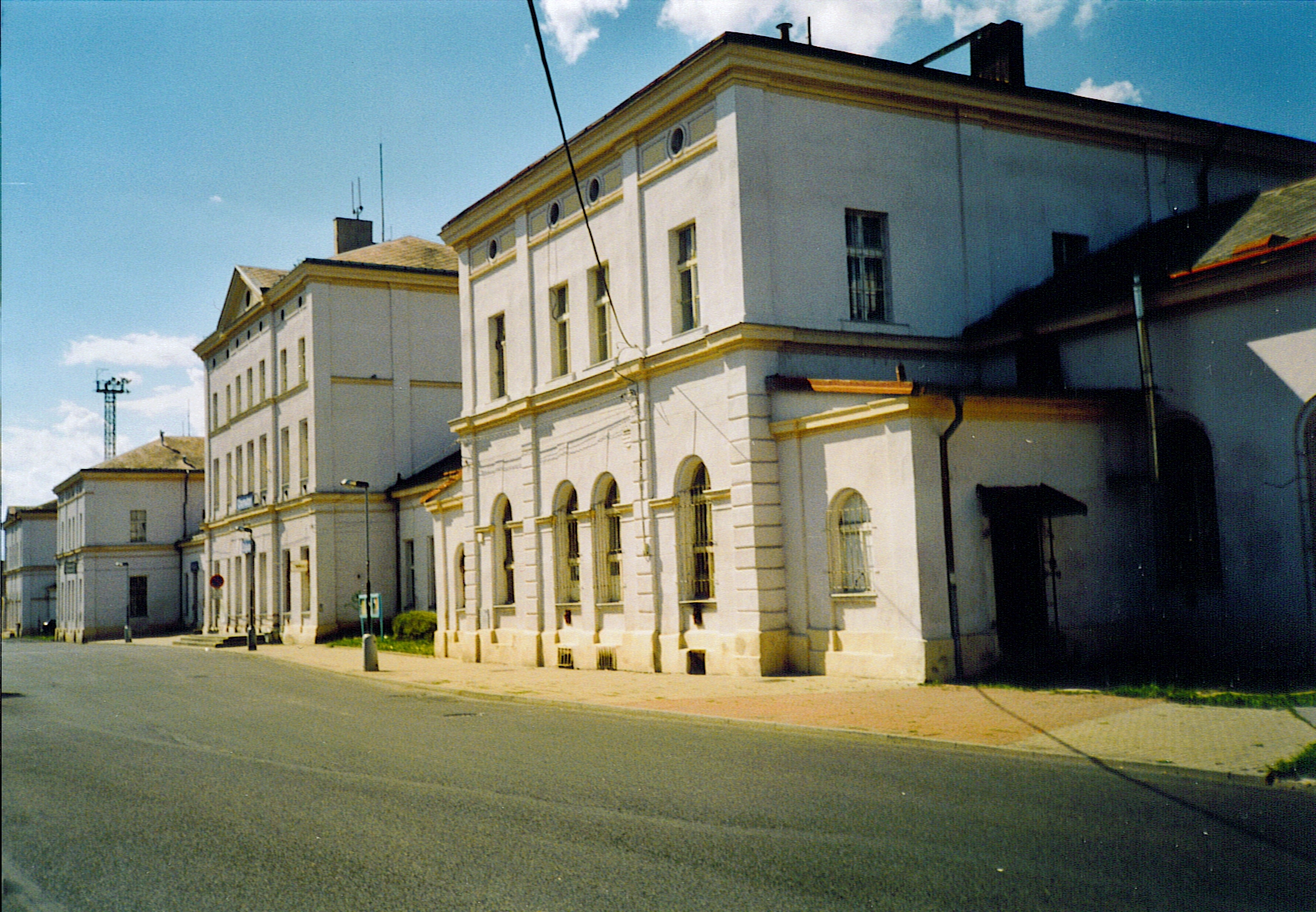 Zwischen Personen- und Güterbahnhof gelegenes Bahnhofsgebäude von Chomutov, straßenseitig fotografiert